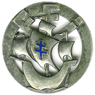 insigne de la 10ème Division d'Infanterie FFI